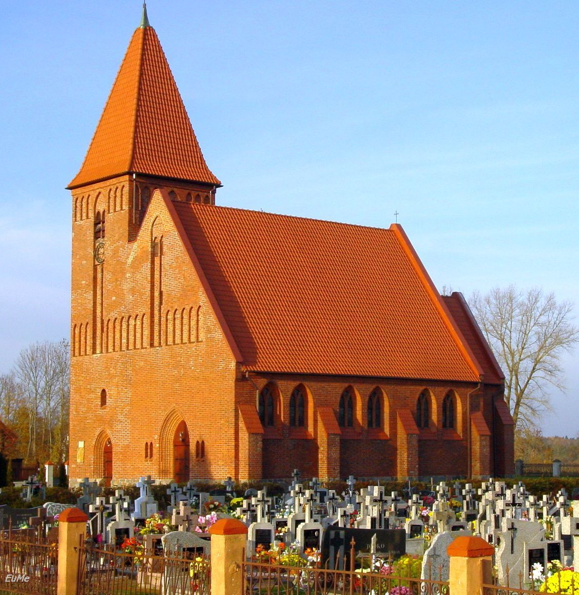 Olszewo Węgorzewskie. Kościół pod wezwaniem Podwyższenia Krzyża Świętego